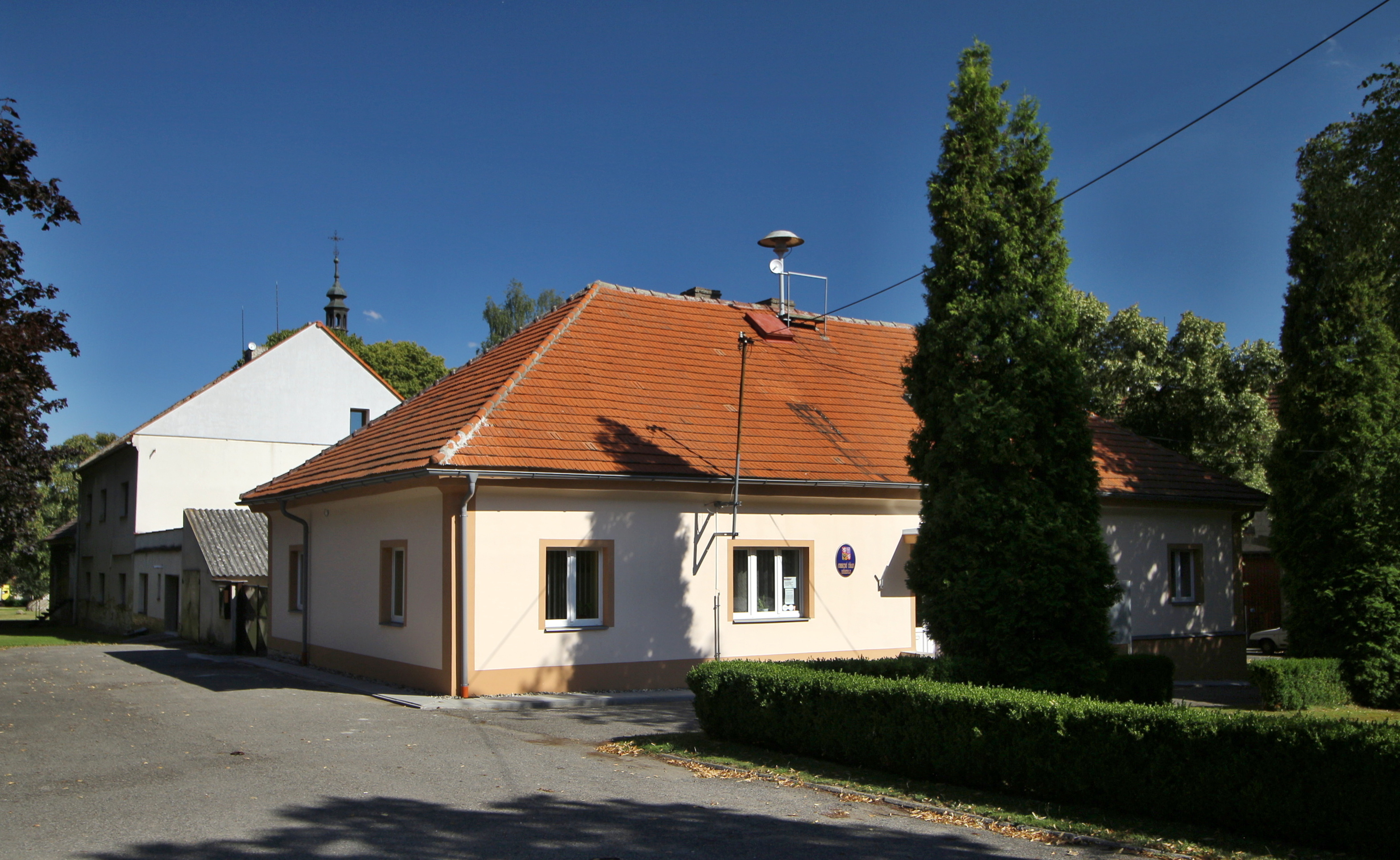 Hředle